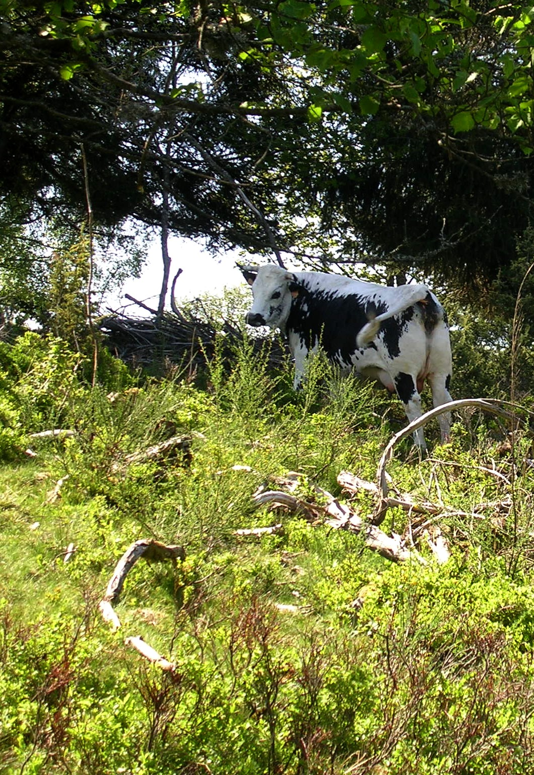 Vache vosgienne dans un pré envahi par les brimbelles (myrtilles) et les genêts, Le Tholy, Vosges.